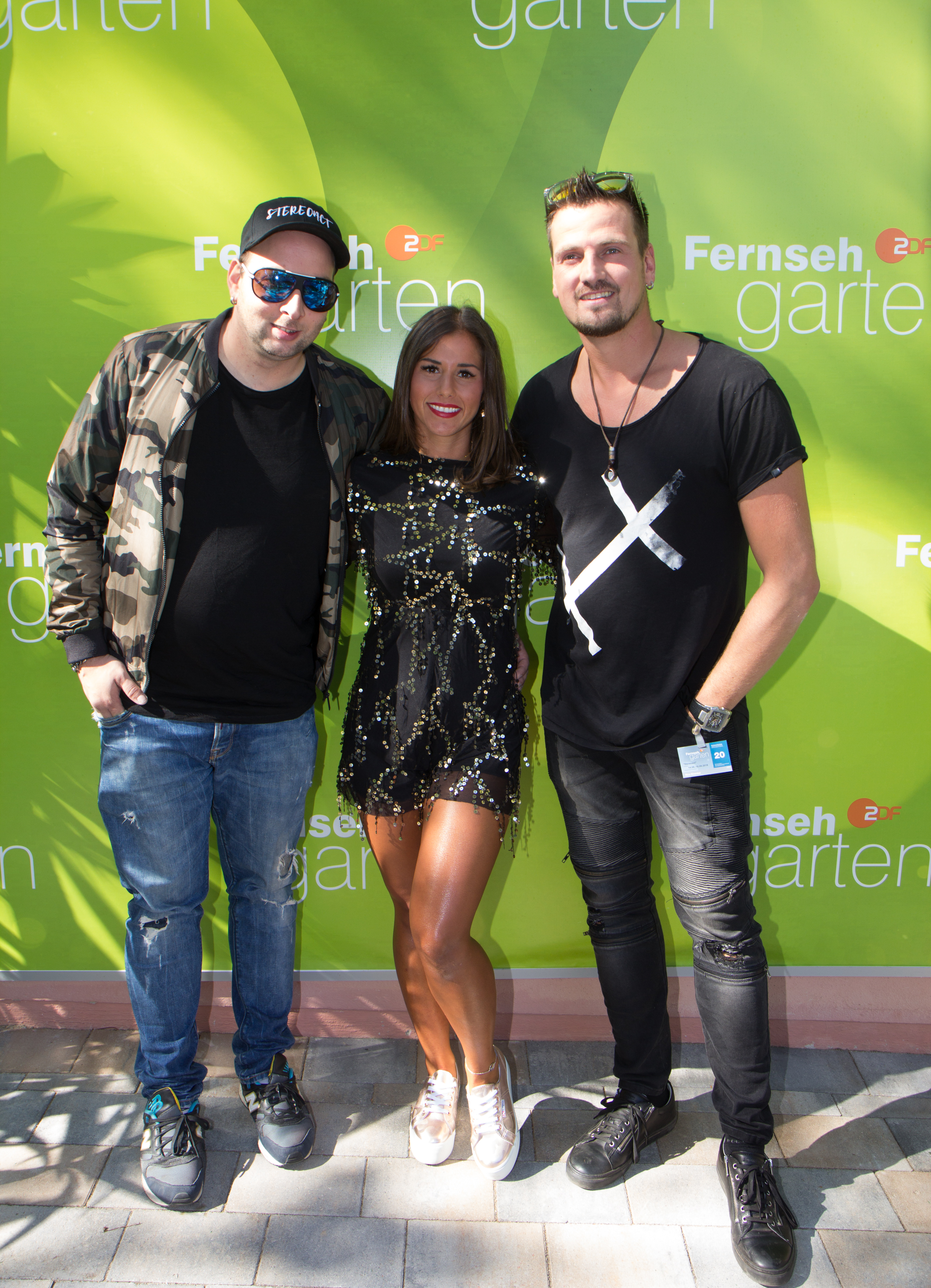 Stereoact feat SARAH als Gast im ZDF-Fernsehgarten am 16. September 2018 in Mainz.